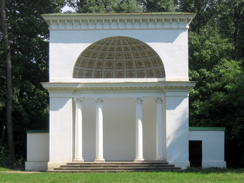 «Ротонда». Конха у Олександрійському дендропарку.